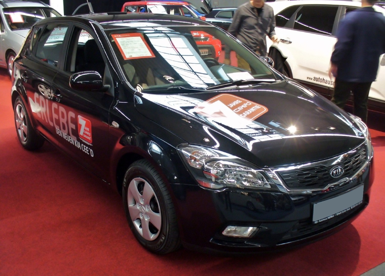 Kia cee'd